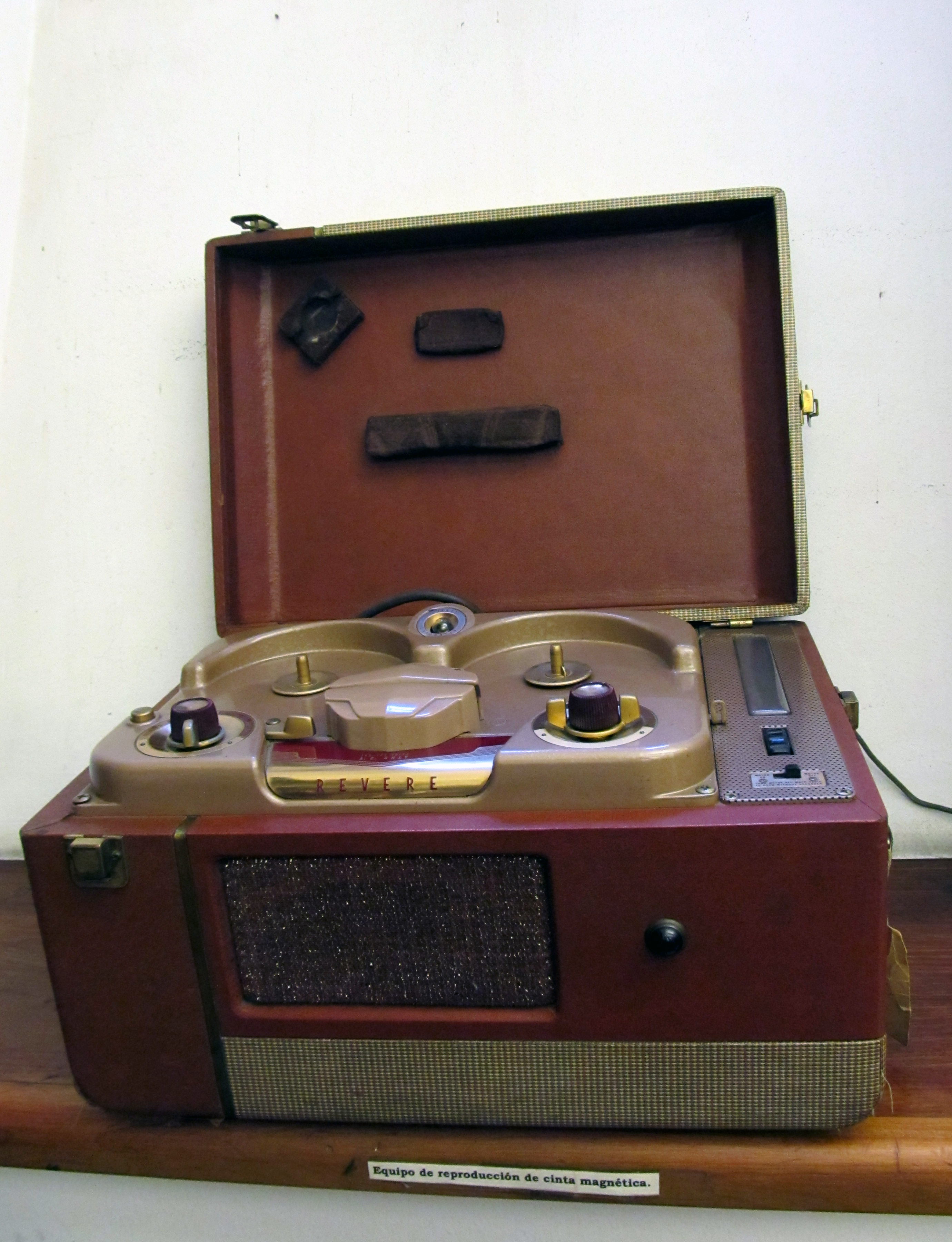 Magnetófono de bobina abierta utilizado para grabar los discursos de Salvador Allende.